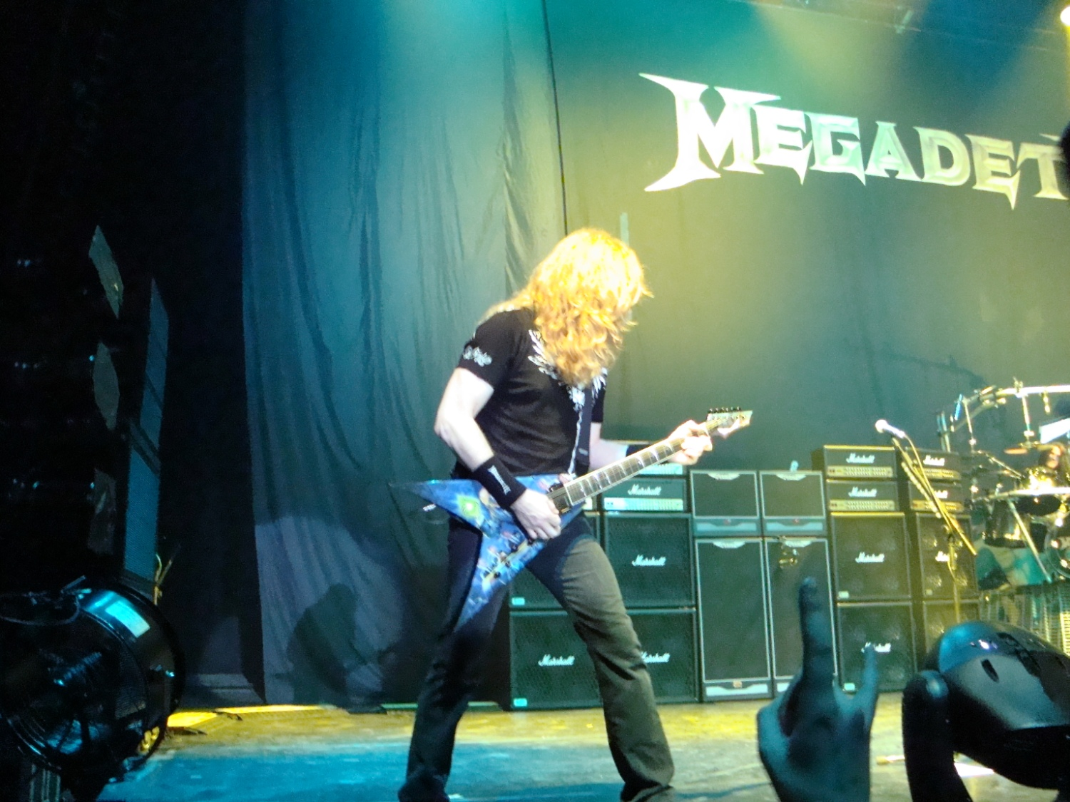 March 3, 2009.